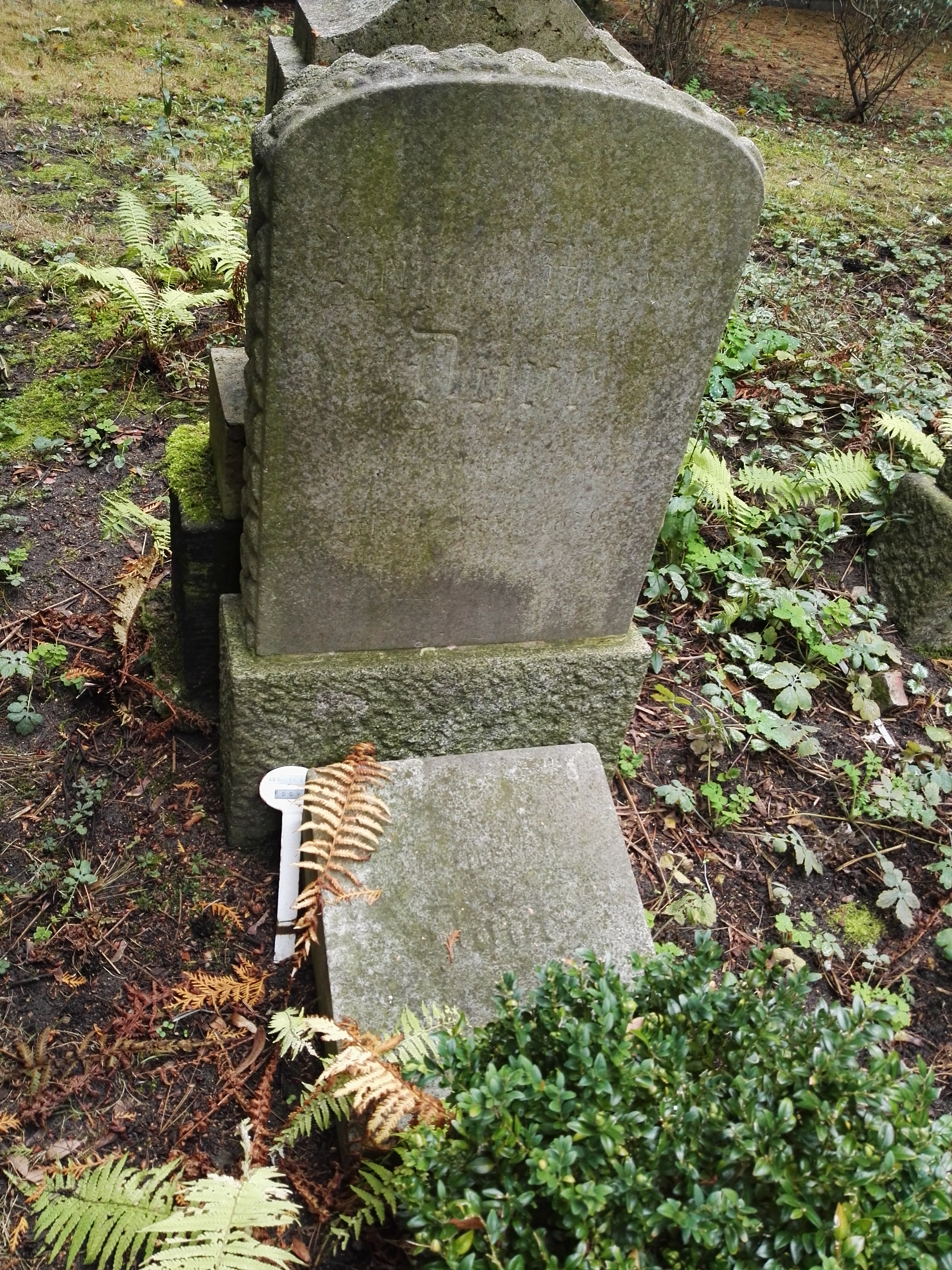 Grab von Heinrich Wilhelm Dove (Physiker) (1803–1879) (Ehrengrab) und Heinrich Wilhelm Dove (Jurist) (1853–1931) auf dem St.-Marien- und St.-Nicolai-Friedhof Pankow. Ehrengrab